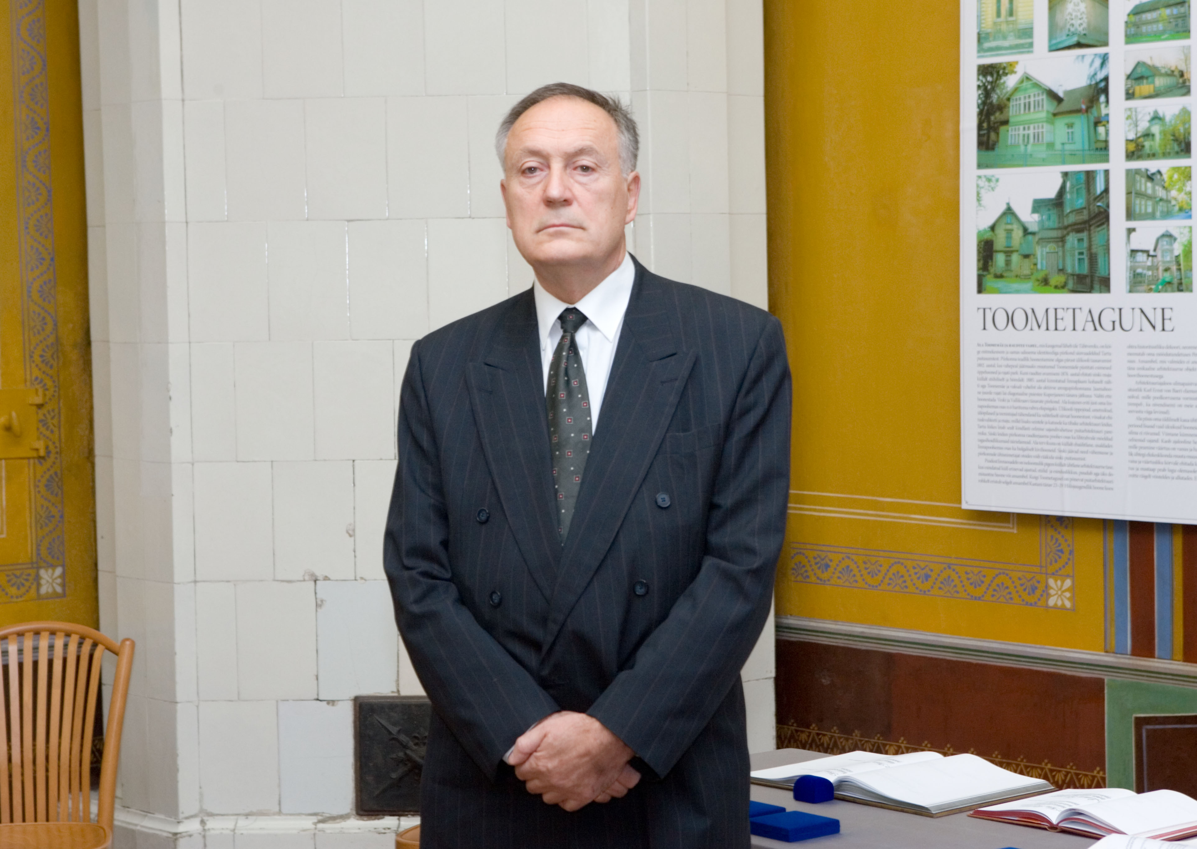 TÜ emeriitprofessor Jaak Kangilaski Tartu Ülikooli kunstimuuseumis. Rektor Jaak Aaviksoo vastuvõtt ülikooli pensioneerunud töötajatele